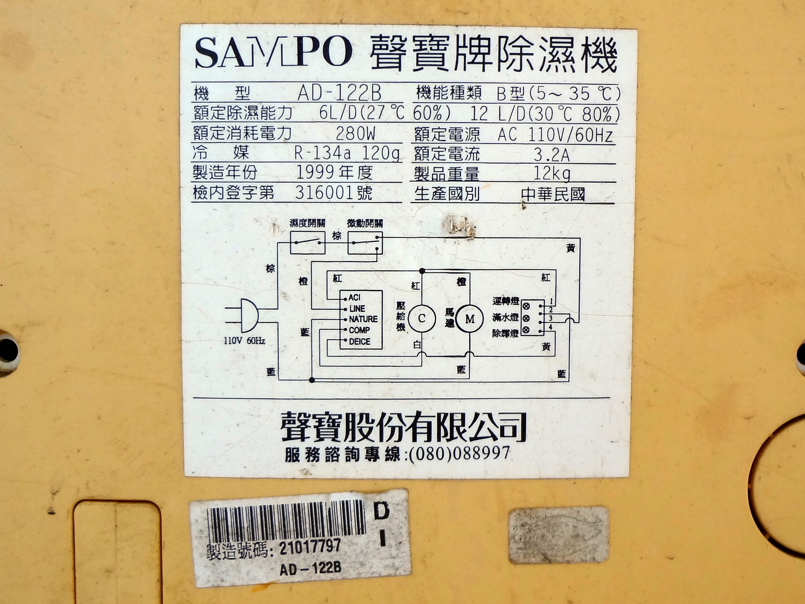 1999年聲寶牌除濕機AD-122B機身標籤（含配線圖）。